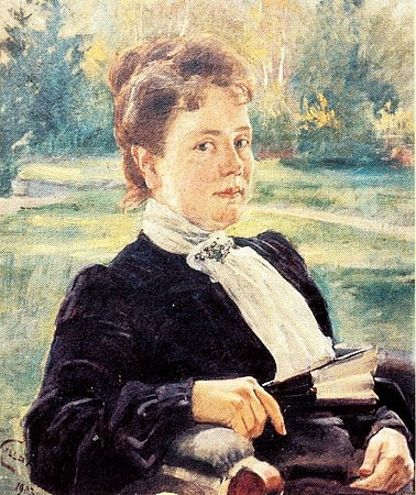 Portret Anny z Kisielnickich Kossakowej (1863-1944)